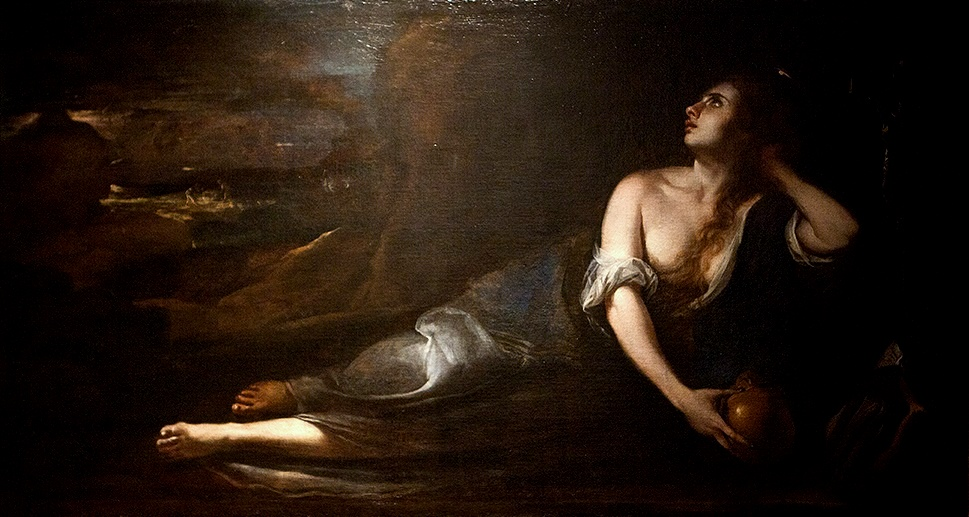 La obra representa a Santa María Magdalena haciendo penitencia por sus pecados.